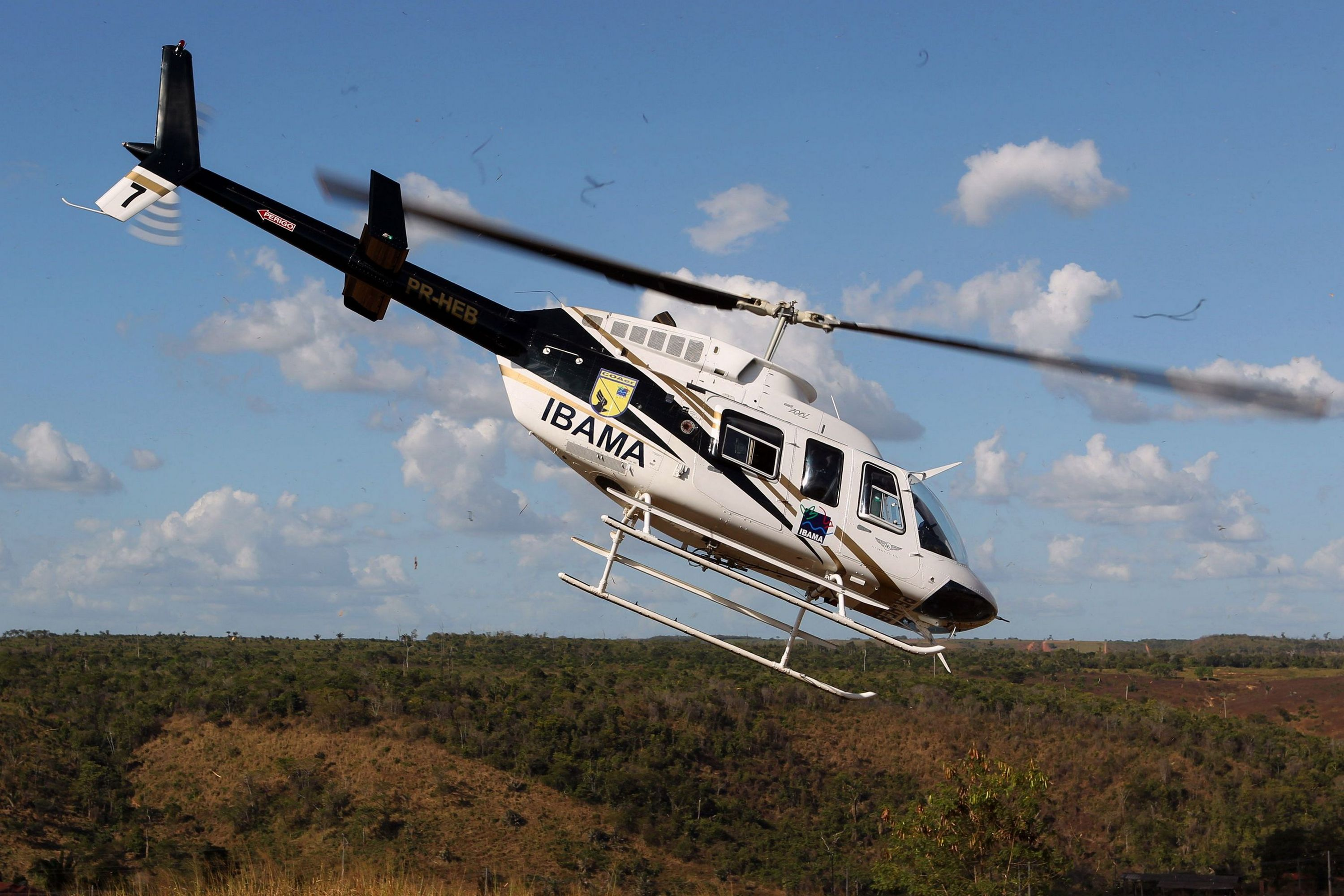 Ibama e Polícia Federal combatem grupo criminoso responsável por extrair e comercializar ilegalmente madeira da Reserva Biológica do Gurupi e das Terras Indígenas Caru e Alto Turiaçu, no Maranhão. Foto: Felipe Werneck - Ascom/Ibama